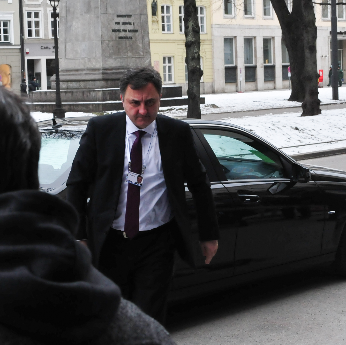 Lado Chanturia, Munich Security Conference 2015 - Münchner Sicherheitskonferenz 2015